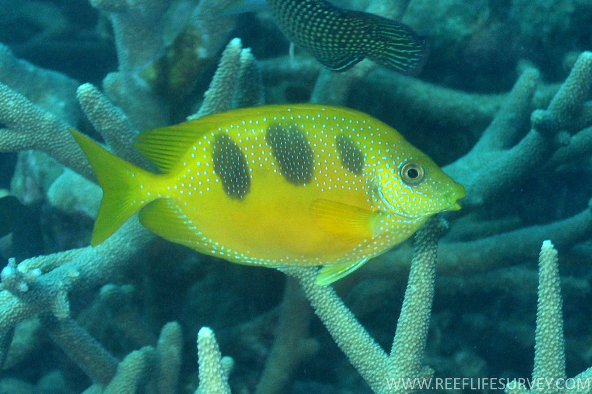 Siganus trispilos en Ningaloo Reef, Western Australia